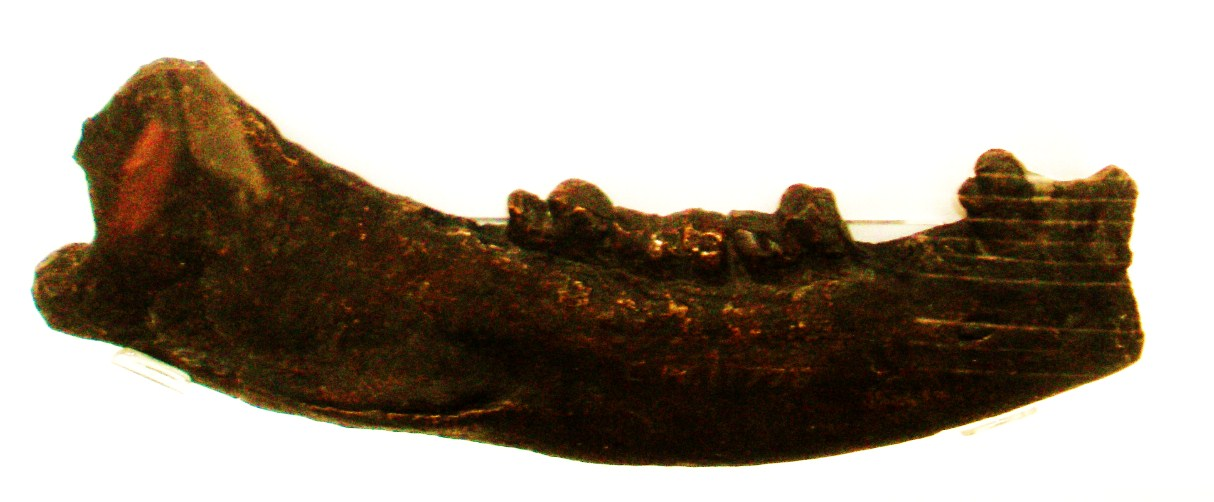 Fossil of Harpagolestes, an extinct mammal -- Took the photo at Natural History Museum, London